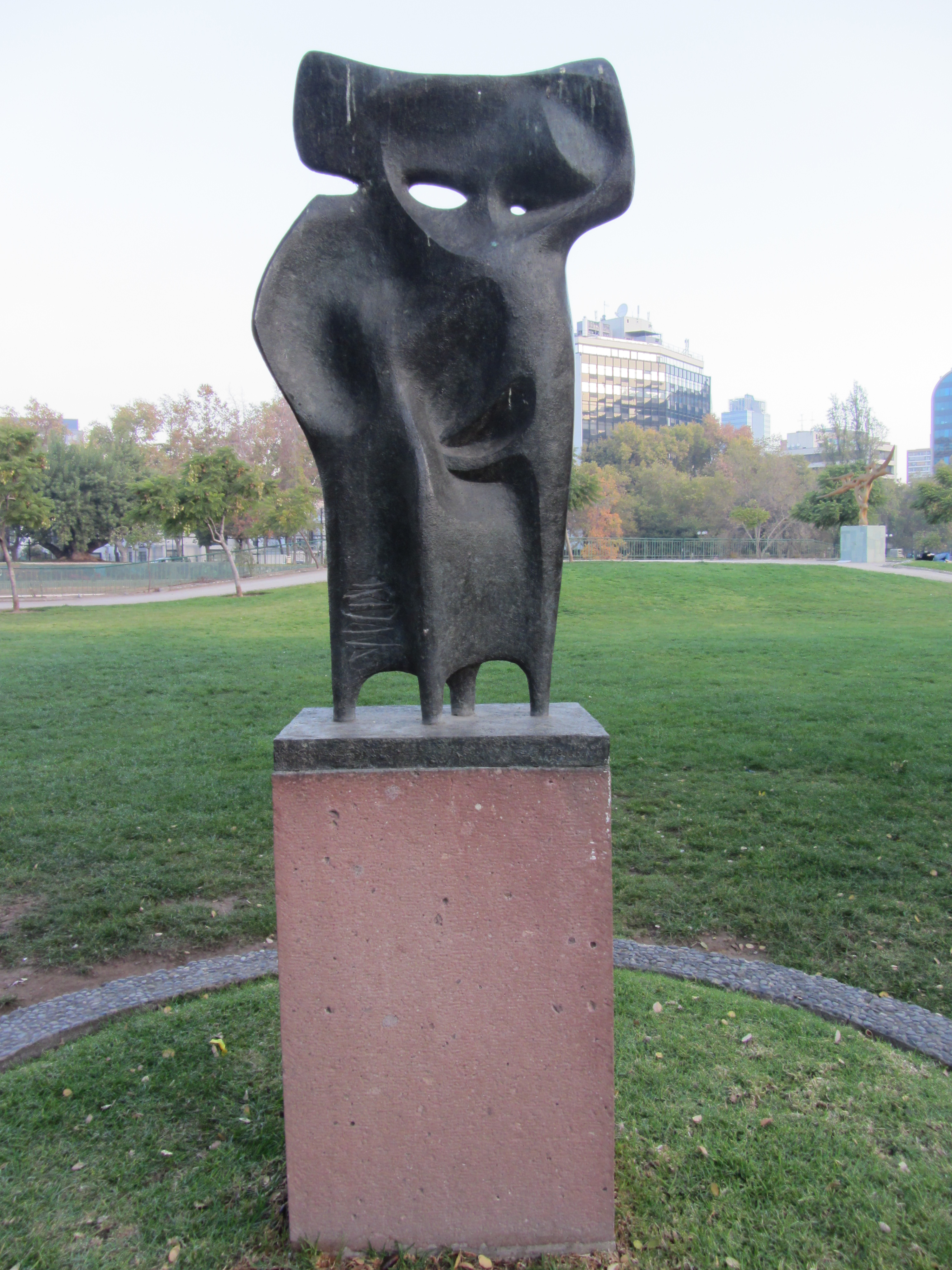 La pareja, obra del escultor chileno del escultor Juan Egenau; Parque de las Esculturas de Providencia, Santiago de Chile.